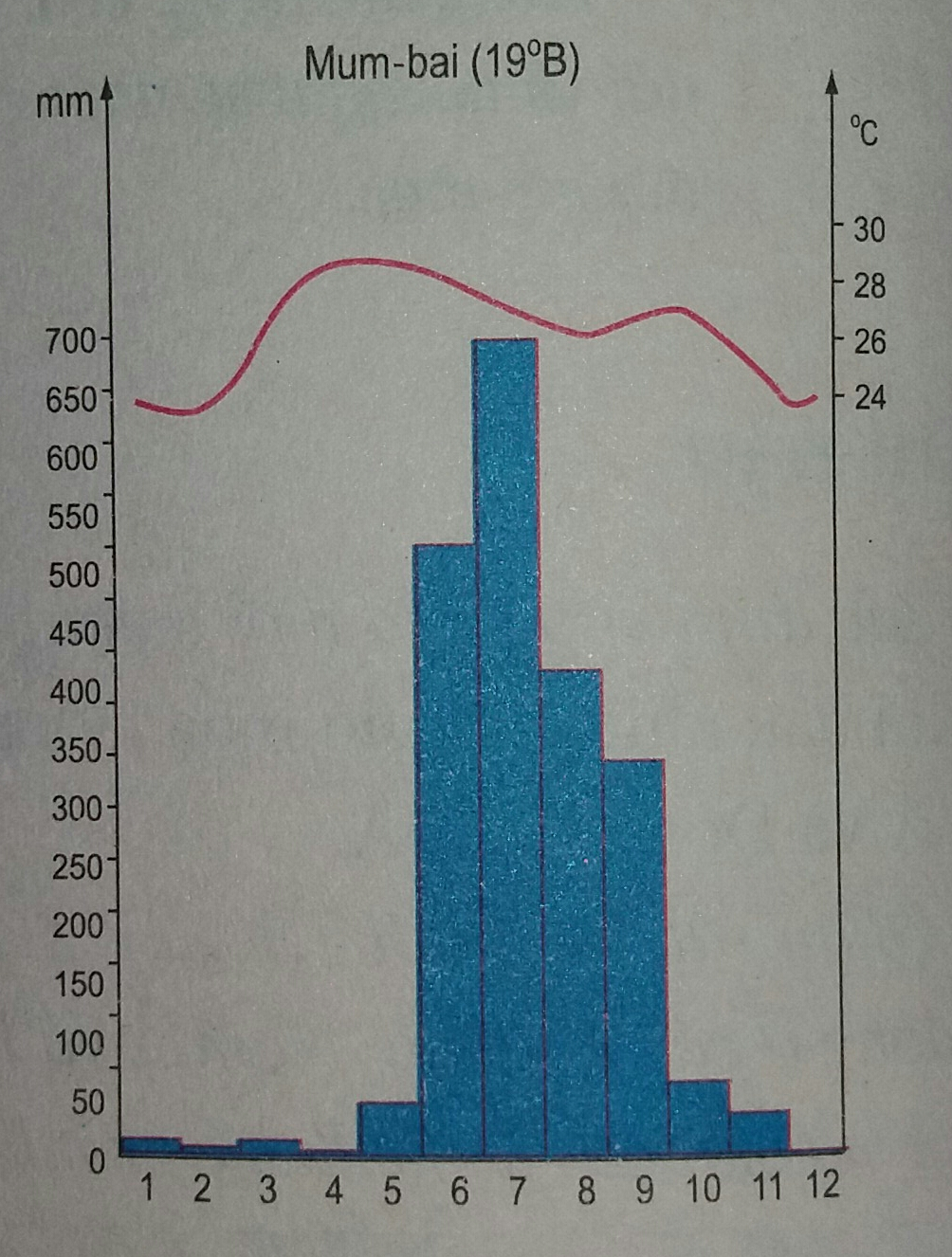 Biểu đồ khí hậu của Munbai